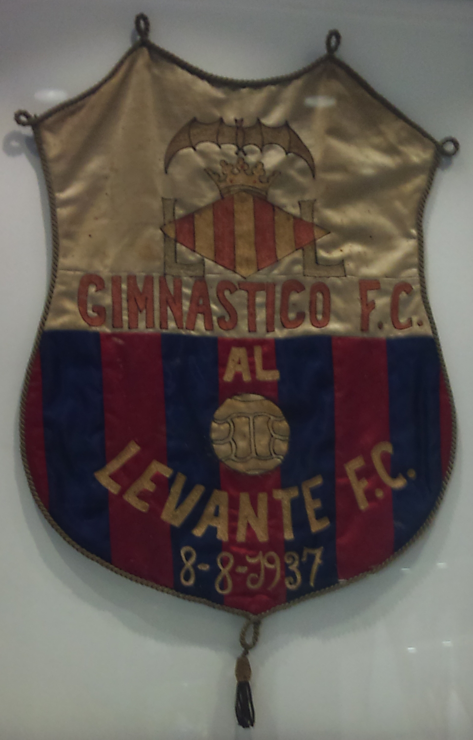 Banderí que representa l'escut del Gimnàstic FC entregat al Llevant FC en motiu d'un partit en homenatge al Llevant, campió de la Copa de l'Espanya Lliure